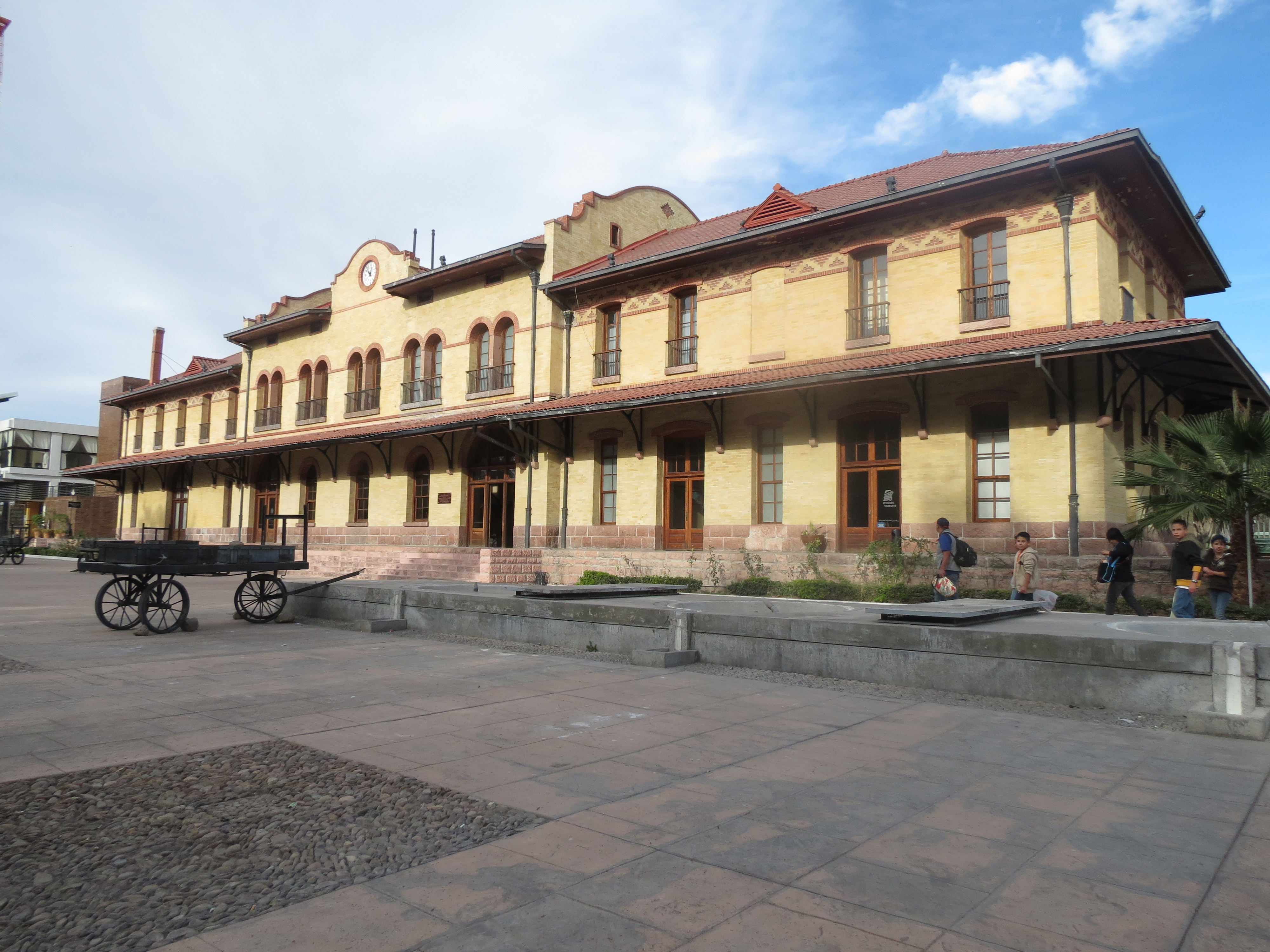 Museo Ferrocarrilero de Aguascalientes